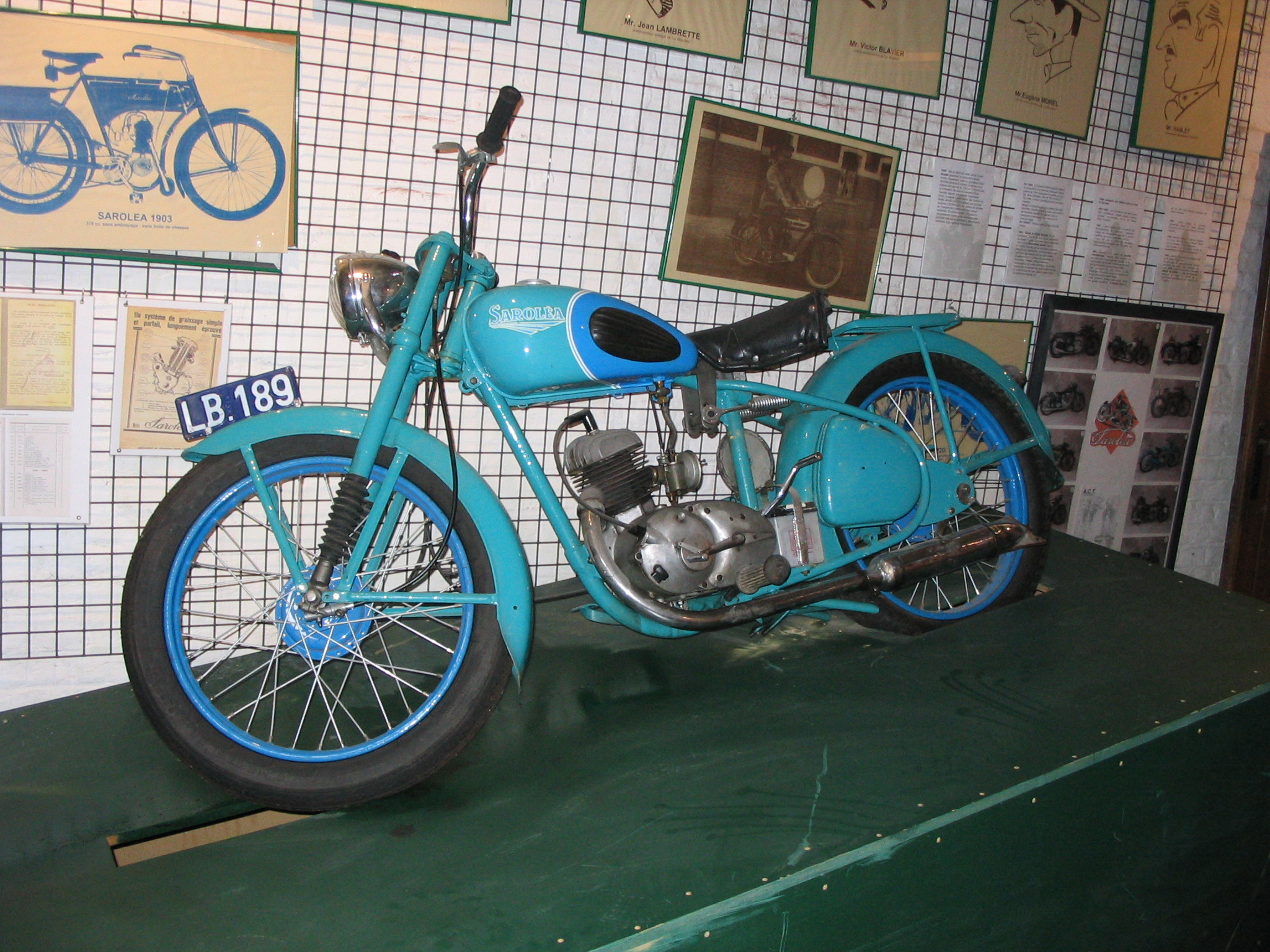 Motocyclette Saroléa : 'Oiseau bleu' (